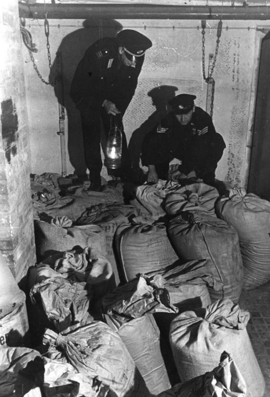 ADN-ZB/Illus- dpd Schwarzhändlernest in St.Pauli ausgehoben Der Inhaber eines Mittagstisch-Betriebes, Waldemar Arndt, hatte sich in seiner Eigenschaft als ehrenamtlicher Helfer seiner Fachgruppe selbst Bezugscheine über erhebliche Warenmengen ausgestellt und die Waren in seinem Keller und anderen Verstecken gehortet. Das Lager von über 150 Zentner Eierbriketts, Nährmittel, Kartoffeln, Haferflocken und Nudeln sowie Gemüse wurde von der Polizei beschlagnahmt und Waldemar Arndt verhaftet. Unser Bild zeigt einen Teil des Lagers, das so groß ist, dass ein Lastzug von 3 Tonnen zum Abtransport nicht genügen wird. 1-10-47 892-47